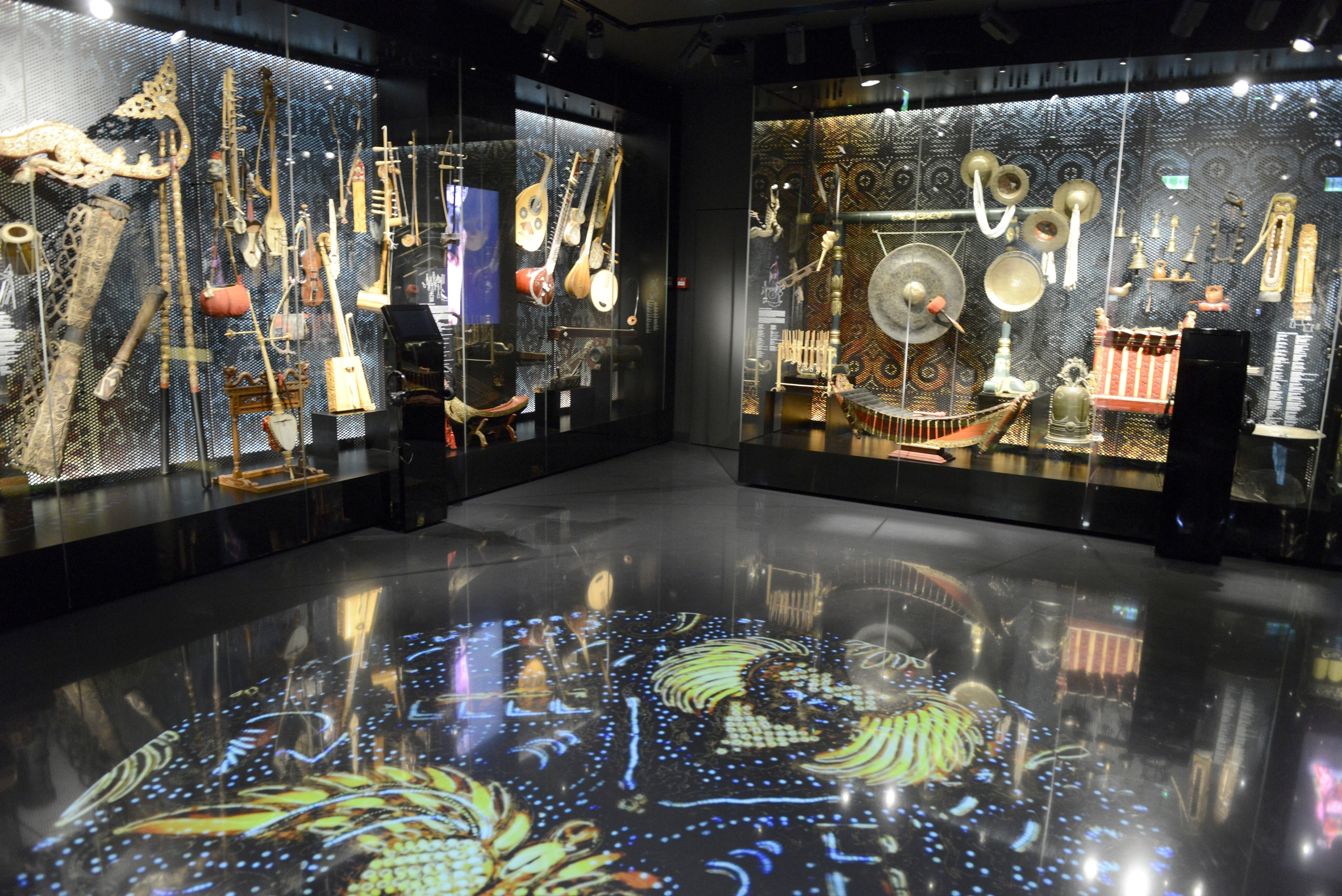 Pierwsza część ekspozycji stałej Muzeum Azji i Pacyfiku poświęcona instrumentom muzycznym. Fot. E. Helbert